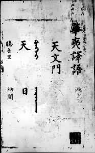 中文（中国大陆）: 《华夷译语》首页。